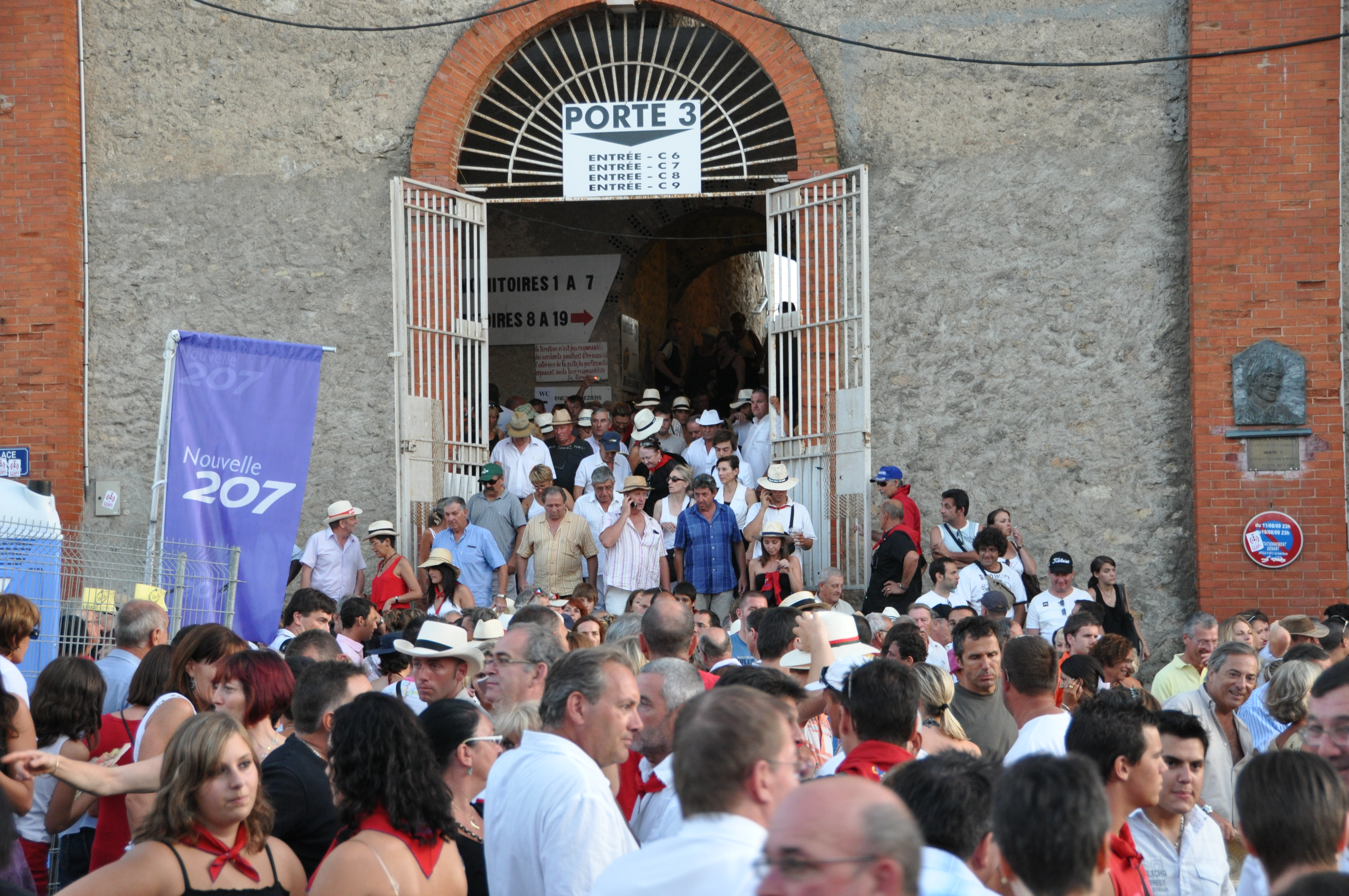 Entrée des arènes pendant la Feria de Béziers